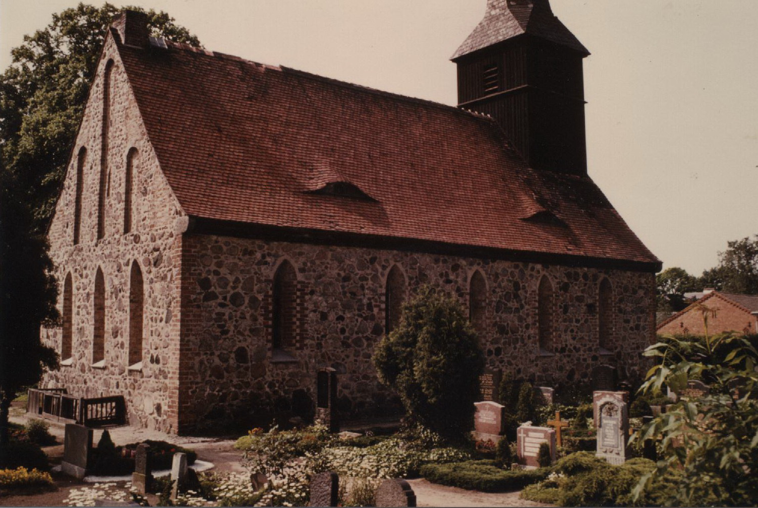 Mittelalterliche Dorfkirche von Berlin-Blankenfelde